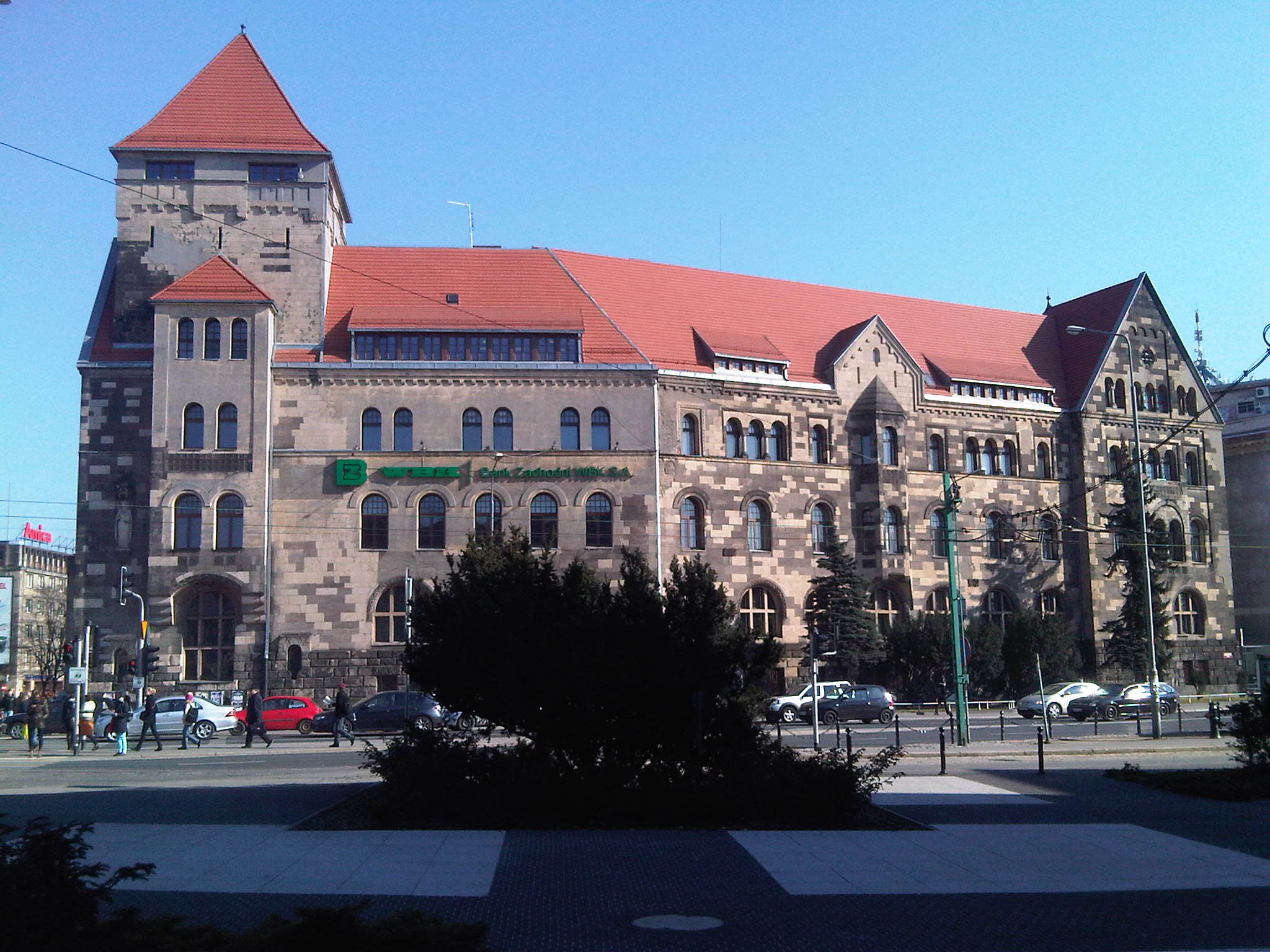 Uniwersytet Ekonomiczny w Poznaniu - budynek B przy skrzyżowaniu alei Niepodległości i ulicy Św. Marcin.